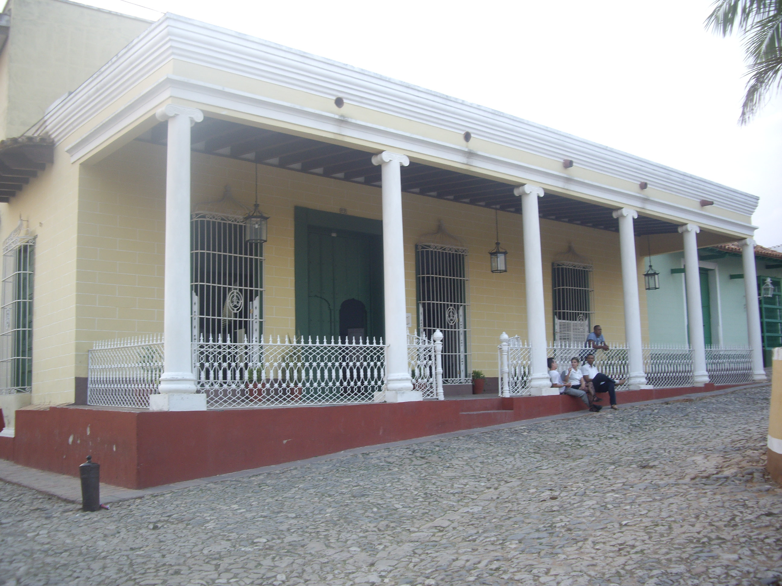 Casa Padrón. Actualment Museu d'Arqueologia Guamuhaya